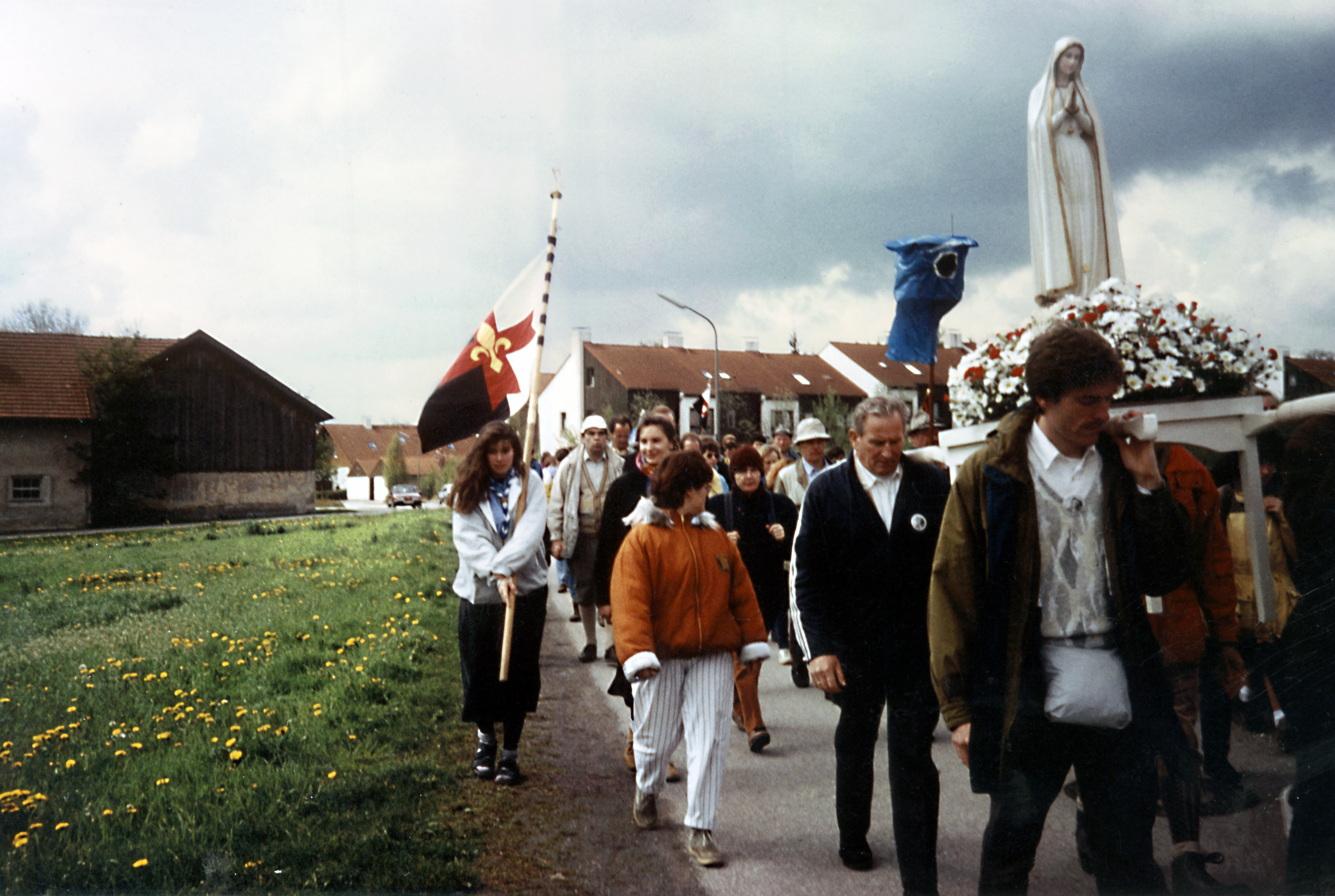 Pfingstwallfahrt nach Altötting. Die dreitägige Pfingstwallfahrt, durchgeführt von der Legio Mariae, von München nach Altötting wurde im Pfadfinderstamm Ägypten-Straßlach zwischen 1983 bis 1994 jedes Jahr durchgeführt. 1991 waren wieder Pfadfinderinnen des KPE-Mädchenstamms Maria Schutz aus Pasing mit dabei.